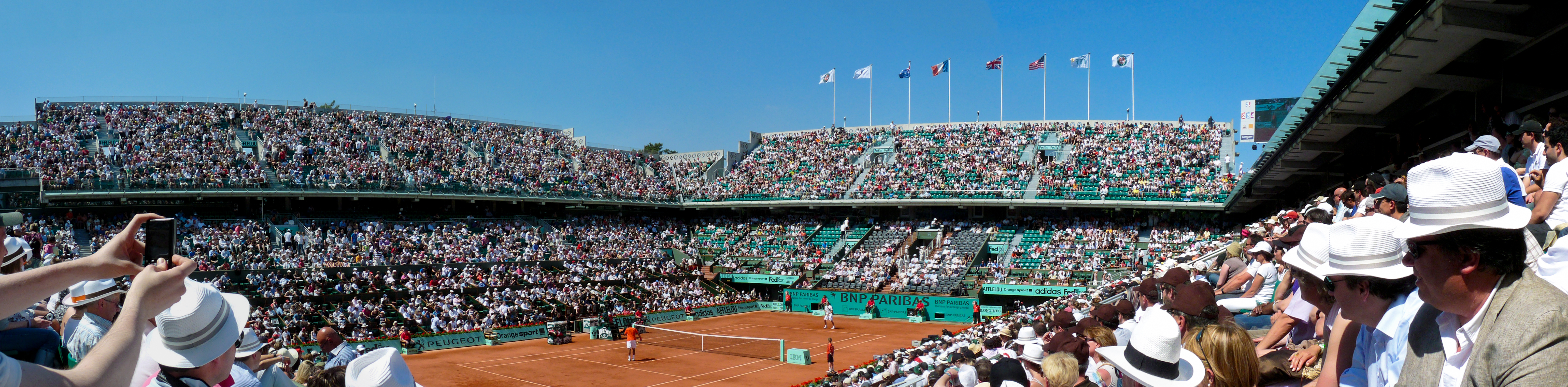 Court Philippe Chatrier - 1er tour de Roland Garros 2010